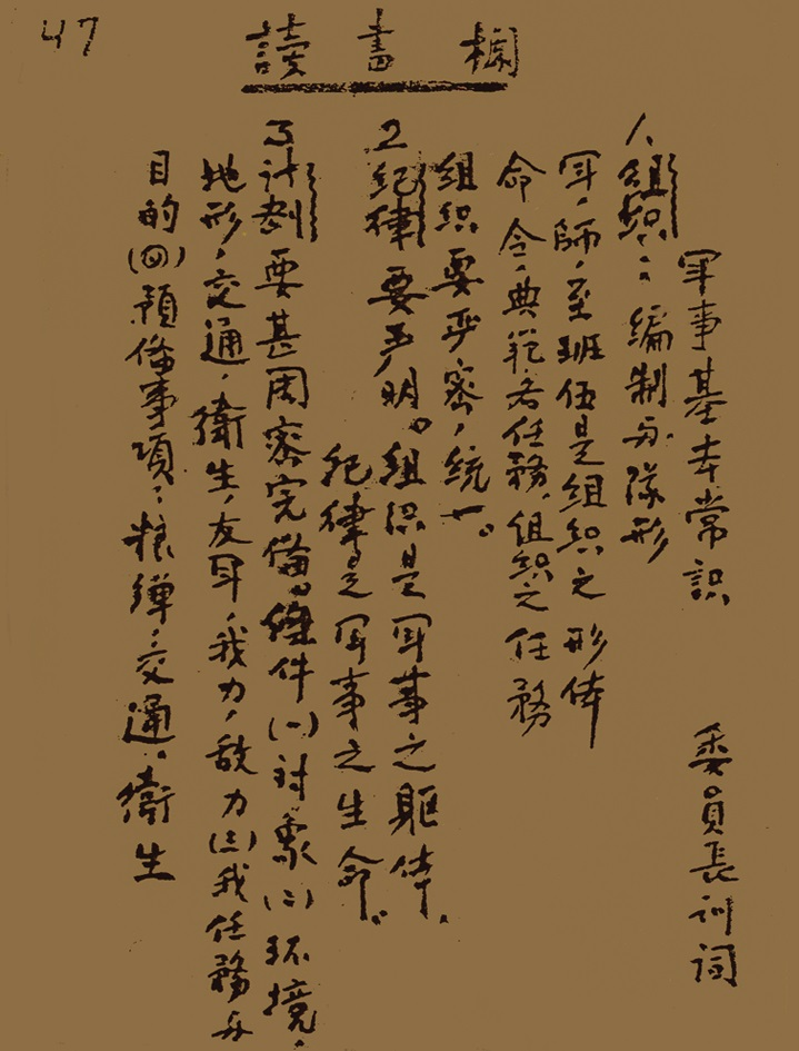 Tờ đầu mục đọc sách